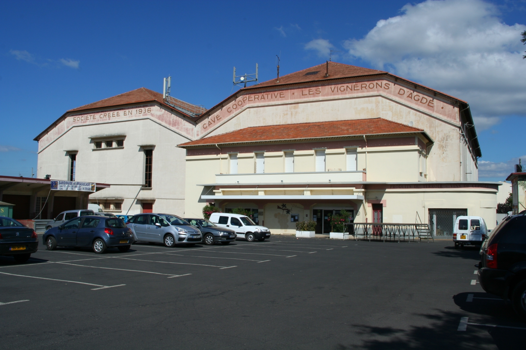 Cave coopérative d'Agde (Hérault - France)